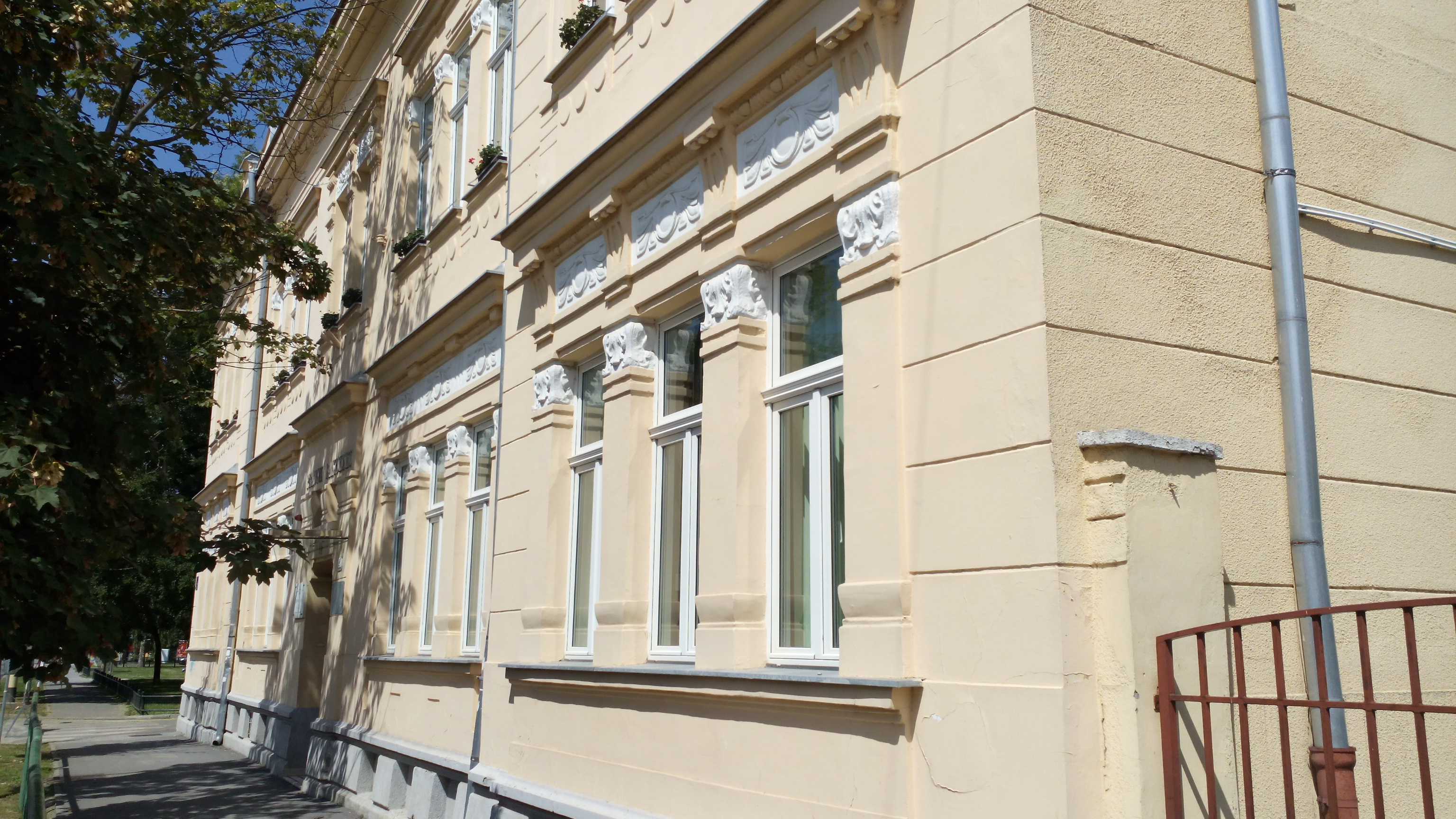 Pravni fakultet u Osijeku.